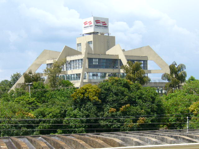 Biblioteca Municipal